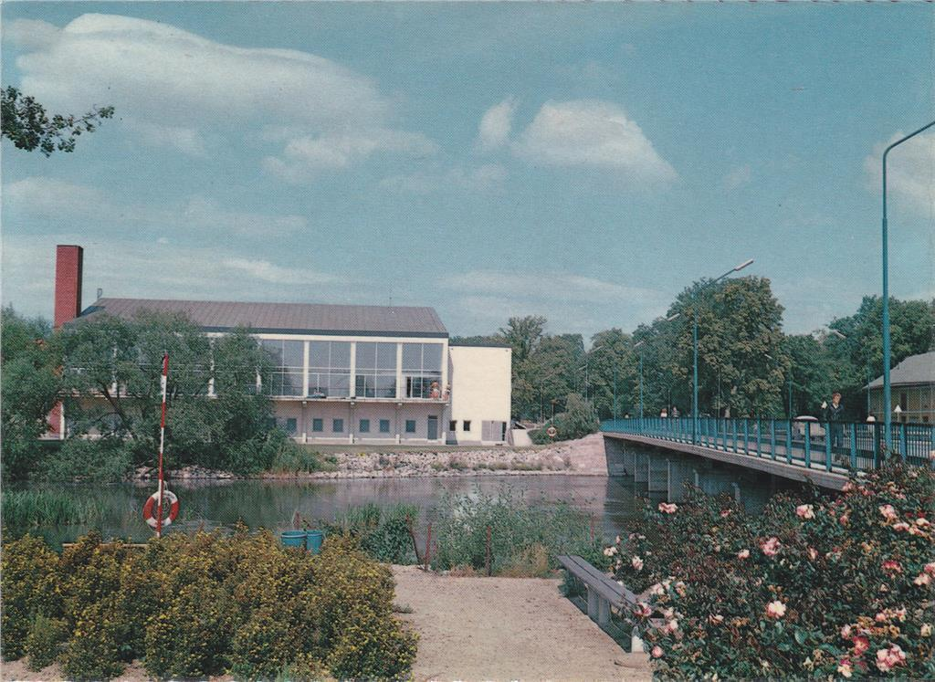 Mariestads Varmbadhus. Arkitekter Gunnar Hollström, Lars-Erik Havstad & Göran Lindell